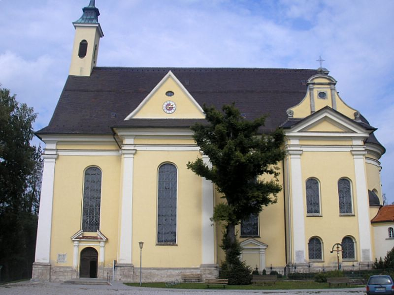 Wallfahrtskirche St. Rasso (Grafrath, Landkreis Fürstenfeldbruck, Oberbayern). Gesamtansicht. Eigene Aufnahme, Sept. 2006 / Pilgrimage church St. Rasso at Grafrath near Fuerstenfeldbruck (Upper Bavaria, Germany). Total view. Own photo, Sept. 2006